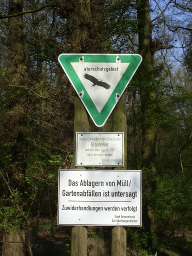 Naturschutzgebiet „Hemmelskamp“